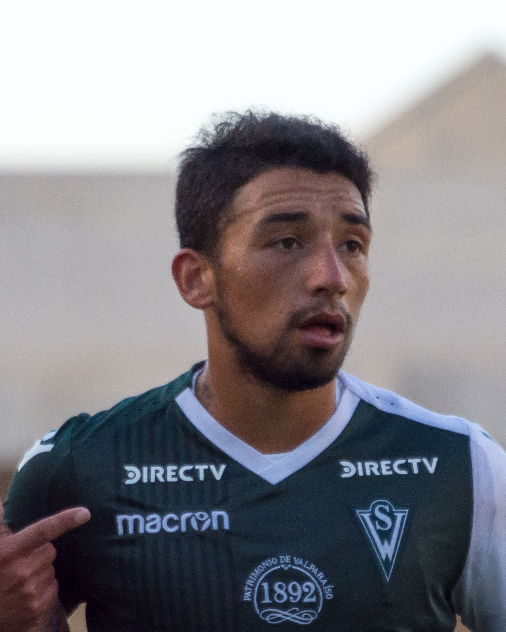 Adrián Cuadra, San Luis v Santiago Wanderers, Estadio Municipal Lucio Fariña Fernández, Quillota, Región de Valparaíso, Chile.